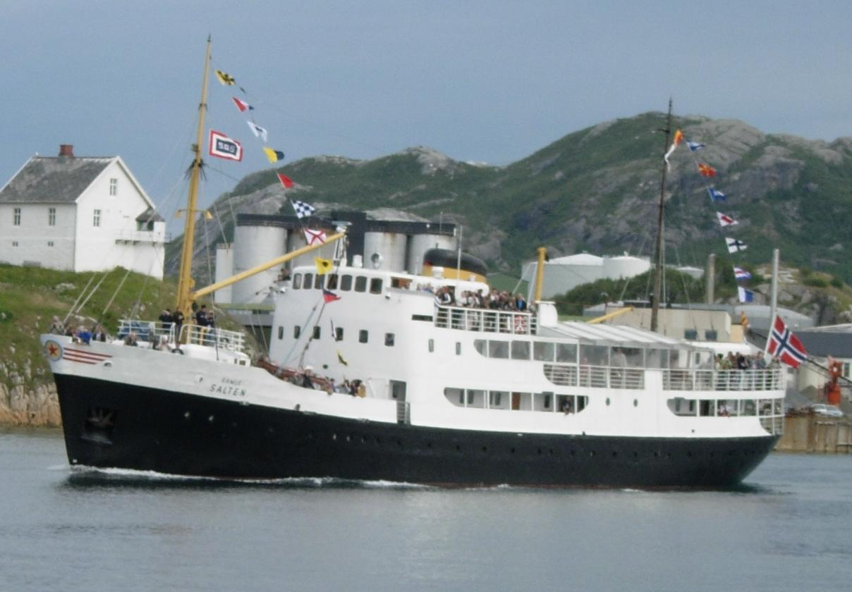 MS «Salten» i Bodø under forbundets Kystens landsstevne 2006 i Bodø